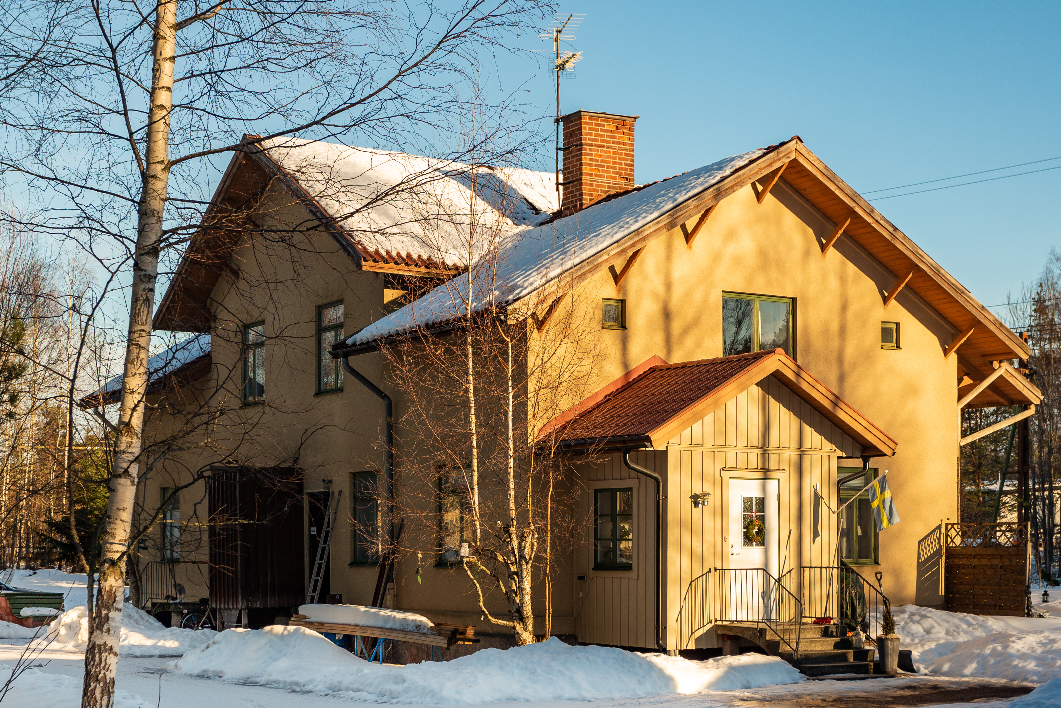 Gamla stationshuset i Broddbo, Sala kommun, Västmanlands län, Sverige.